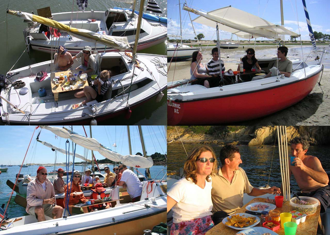 Quatre images illustrant l'intérêt du Tabasco en matière de croisière